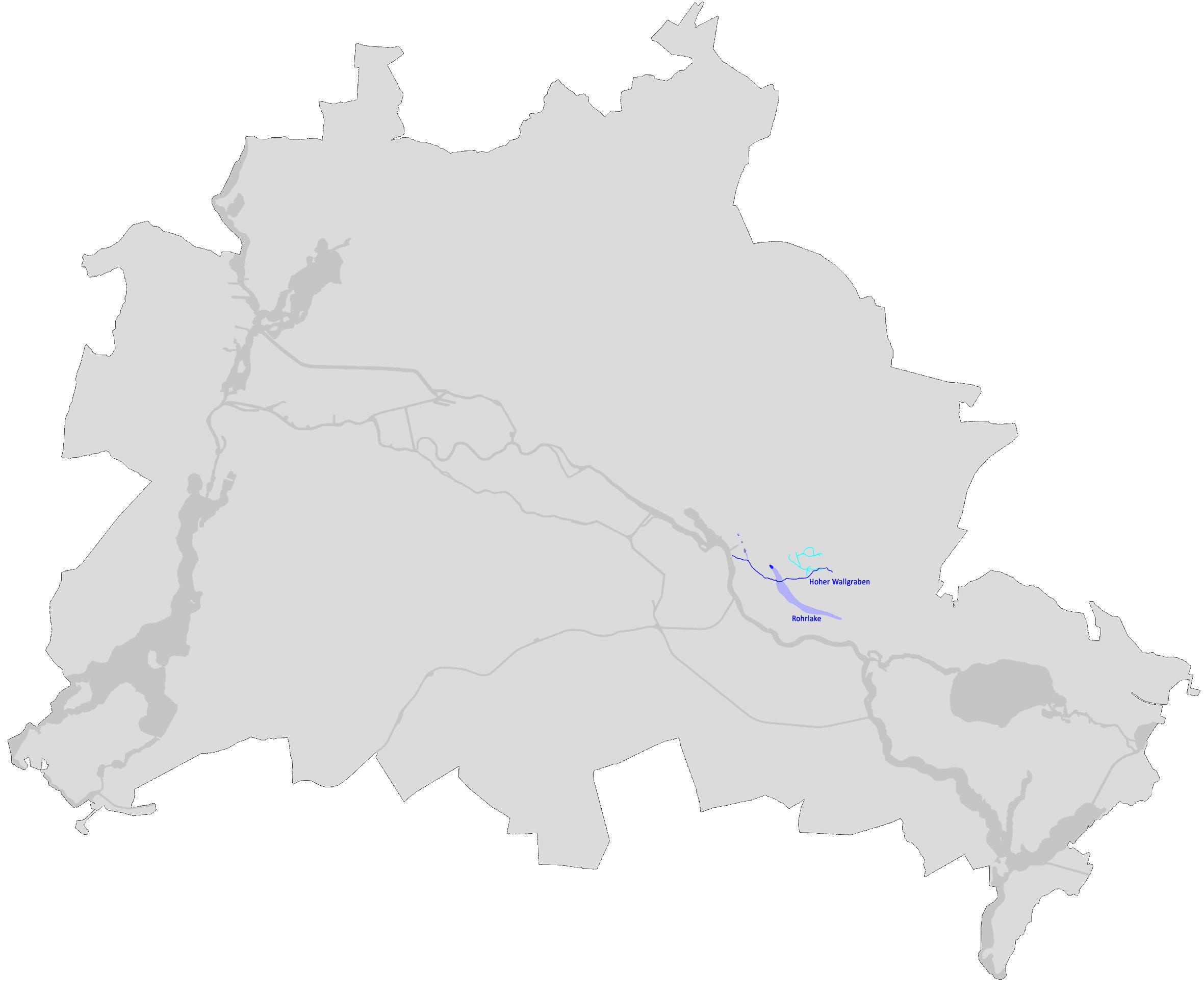 Karte des Hohen Wallgrabens und der Rohrlake, Berlin